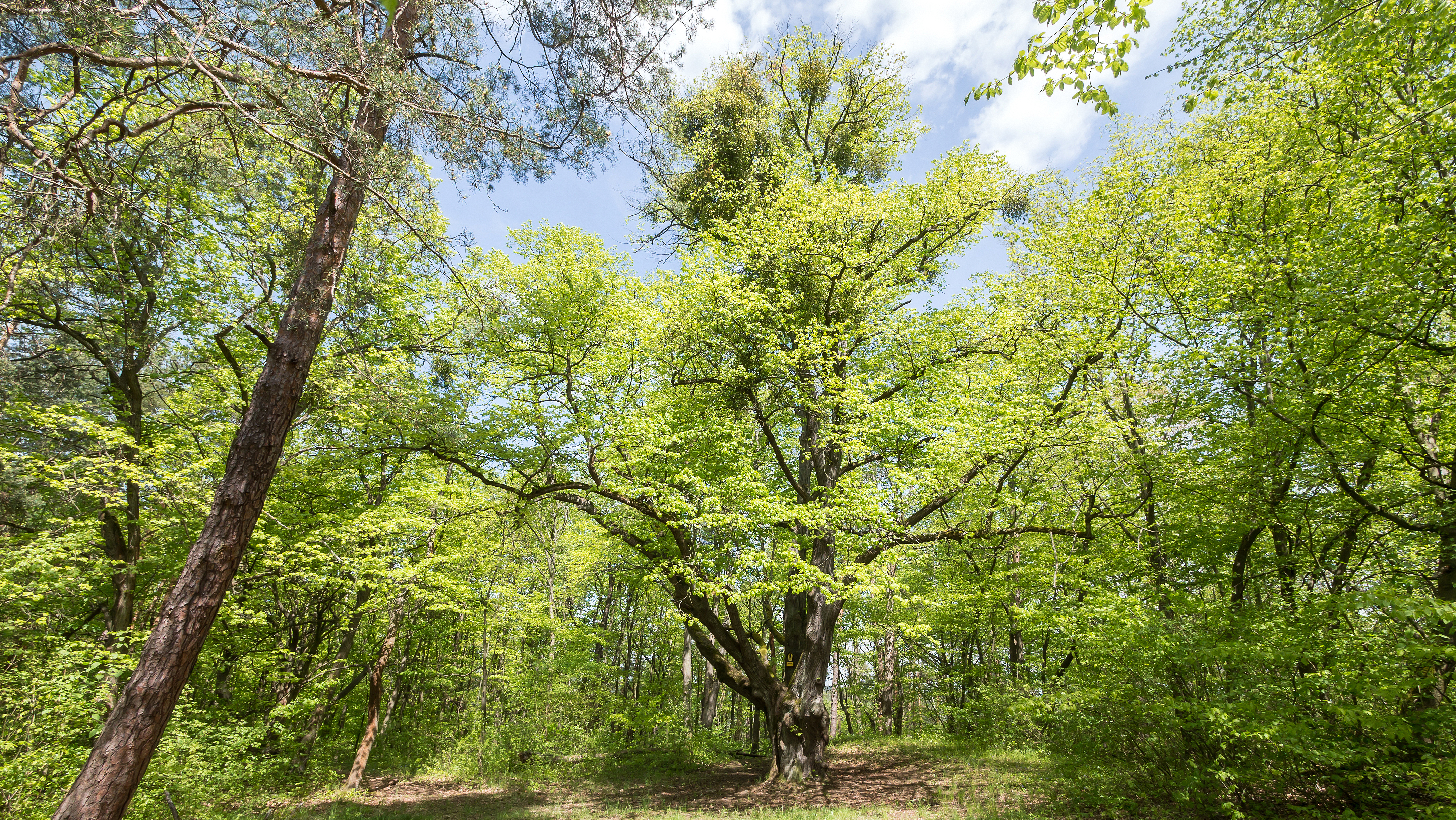 Winterlinde Doc.-Nr. 1963-09 Jena I